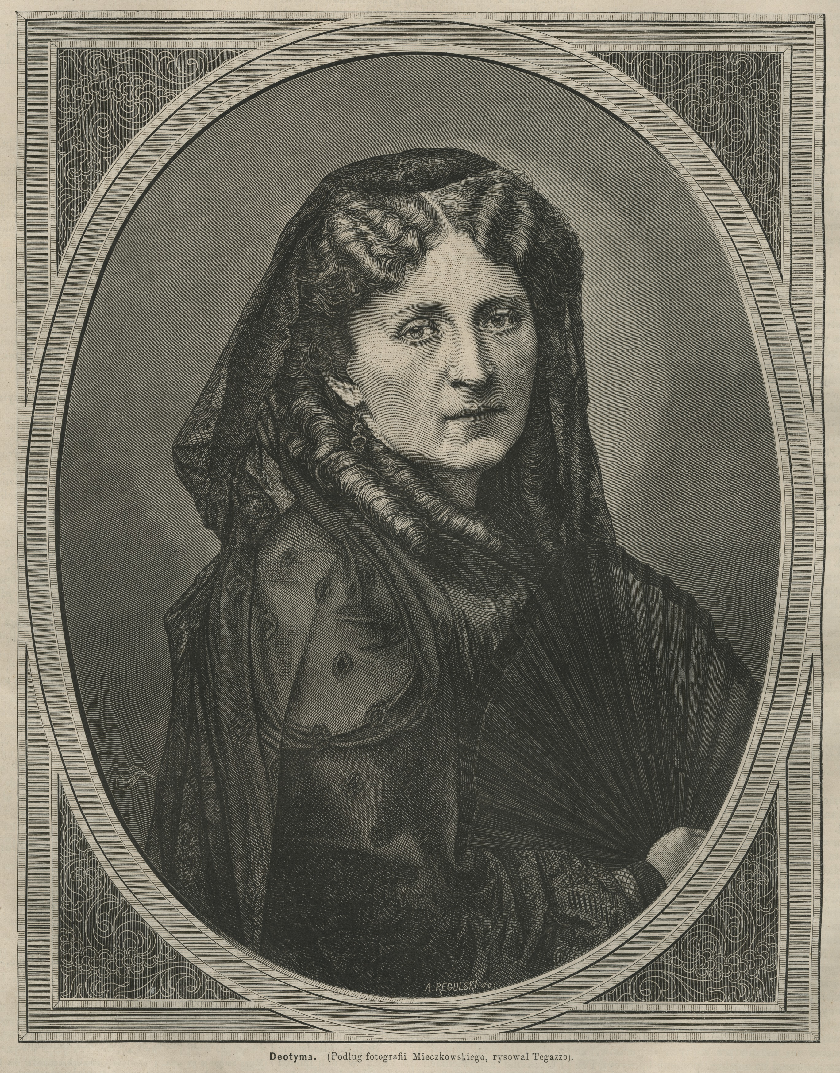 Jadwiga Łuszczewska (Deodyma)